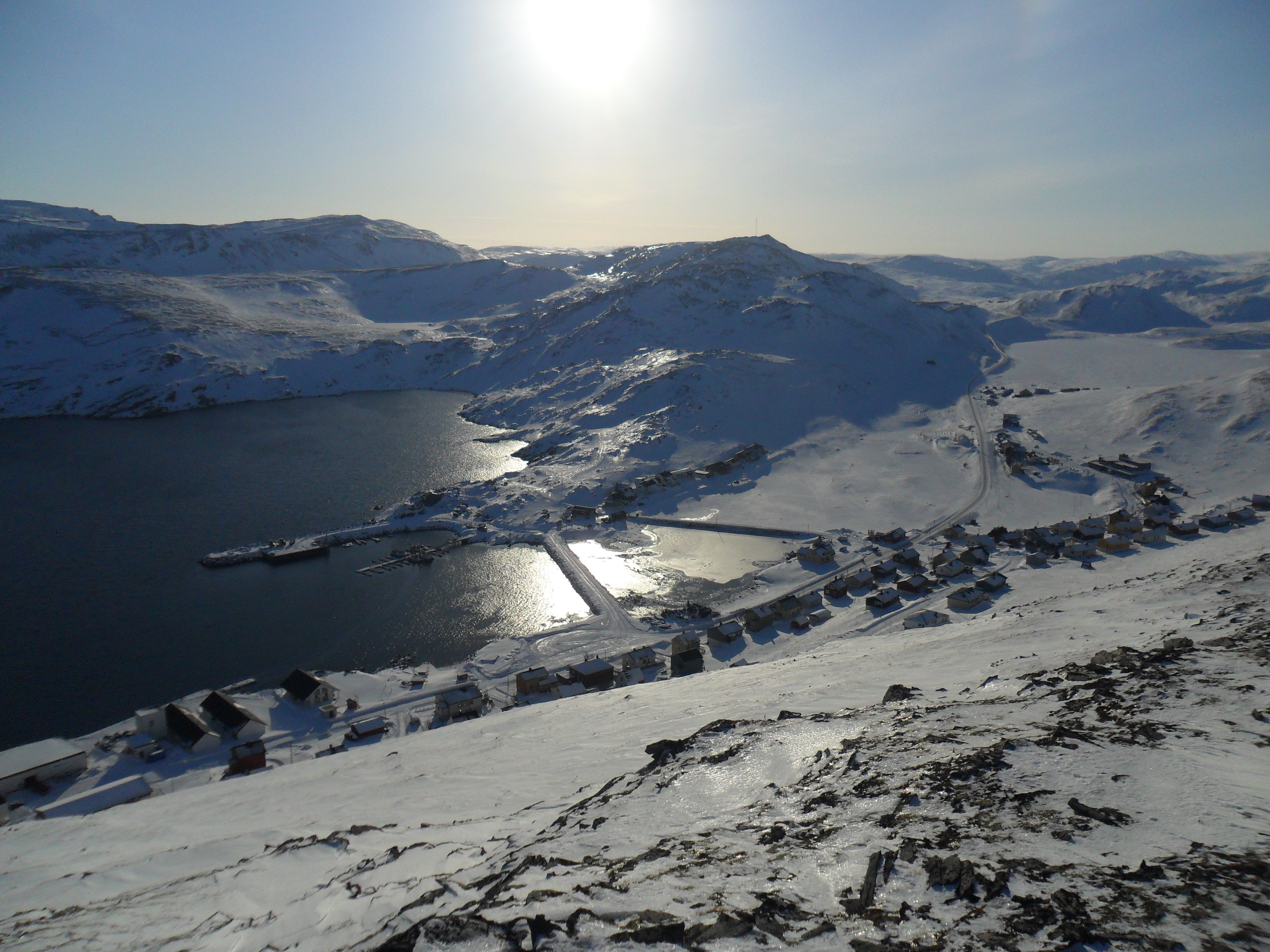 Fiskeværet Skarsvåg sett fra Børnesfjellet.